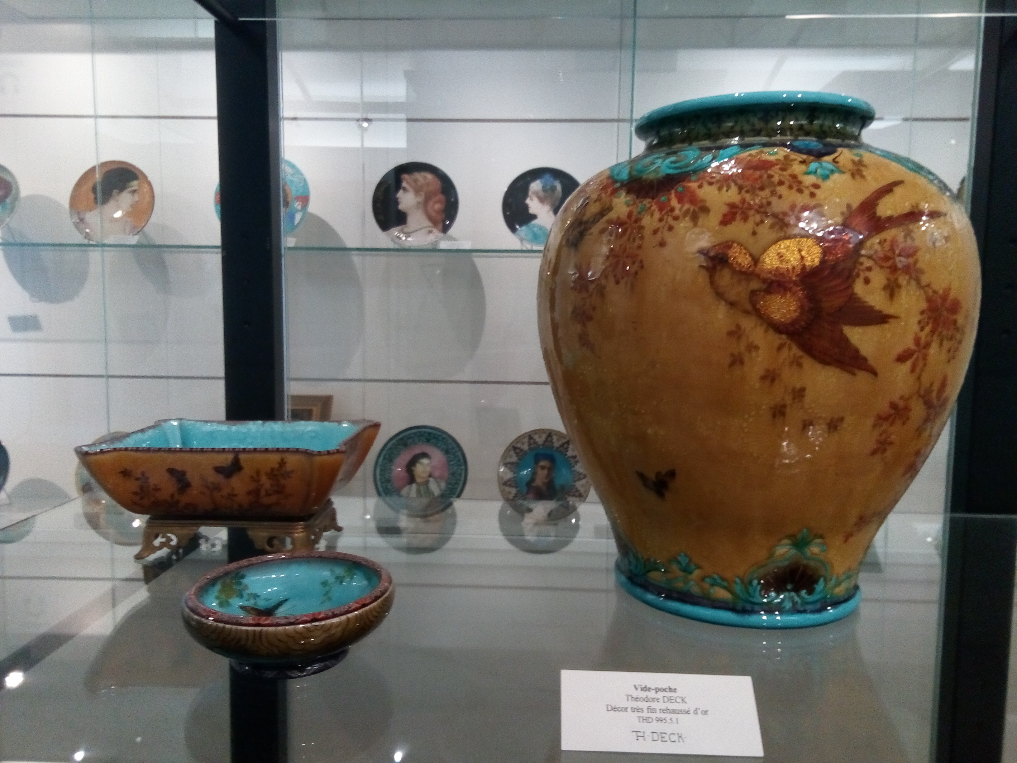 Vue des collections de faïence